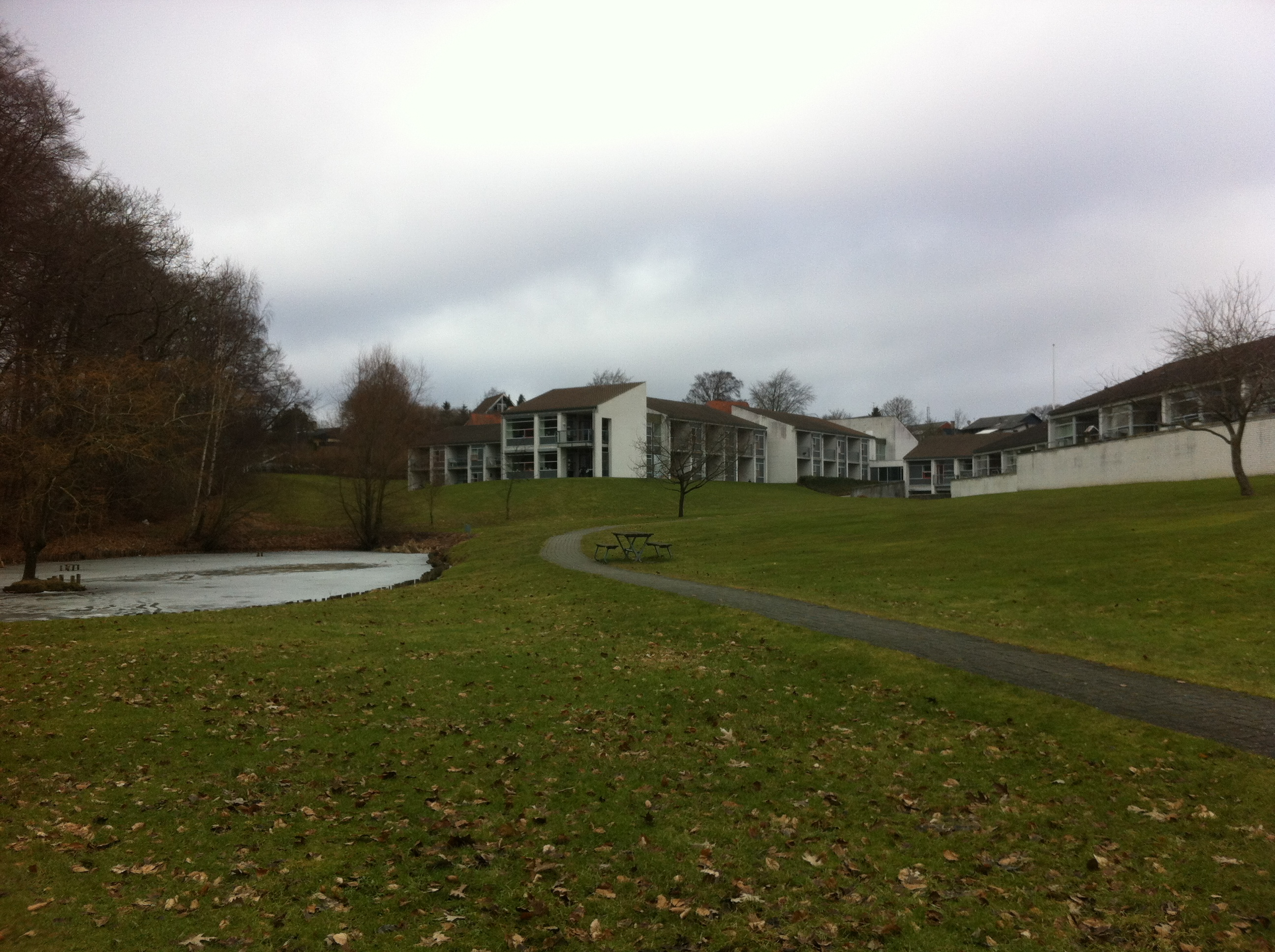 Bernadottegården i Hadsund set fra den lille sø sydvest for.